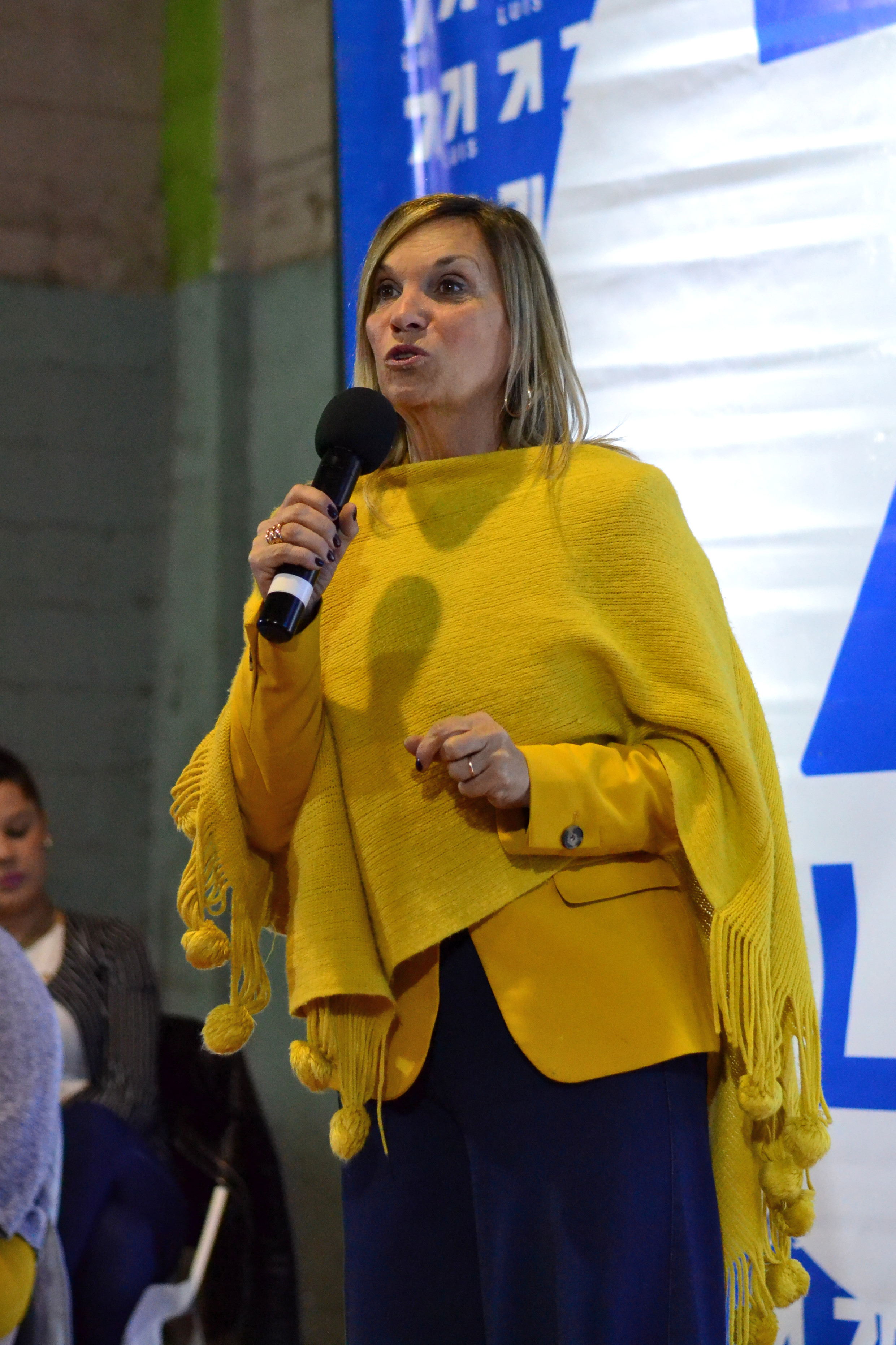 Beatriz Argimón, candidata a la Vicepresidencia de la República por el Partido Nacional, dando un discurso en un acto durante la campaña electoral en setiembre de 2019.